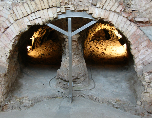 Fornaci romane, Lonato, Brescia